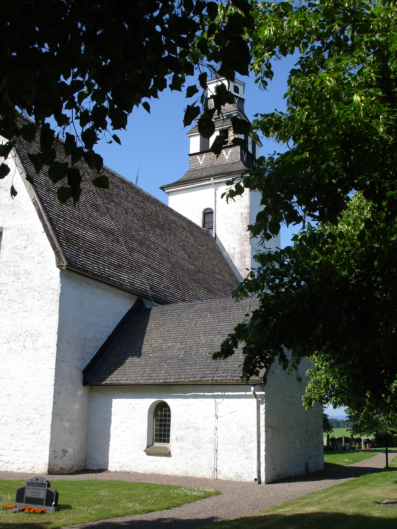 Hovs kyrka i Östergötland sommaren 2009